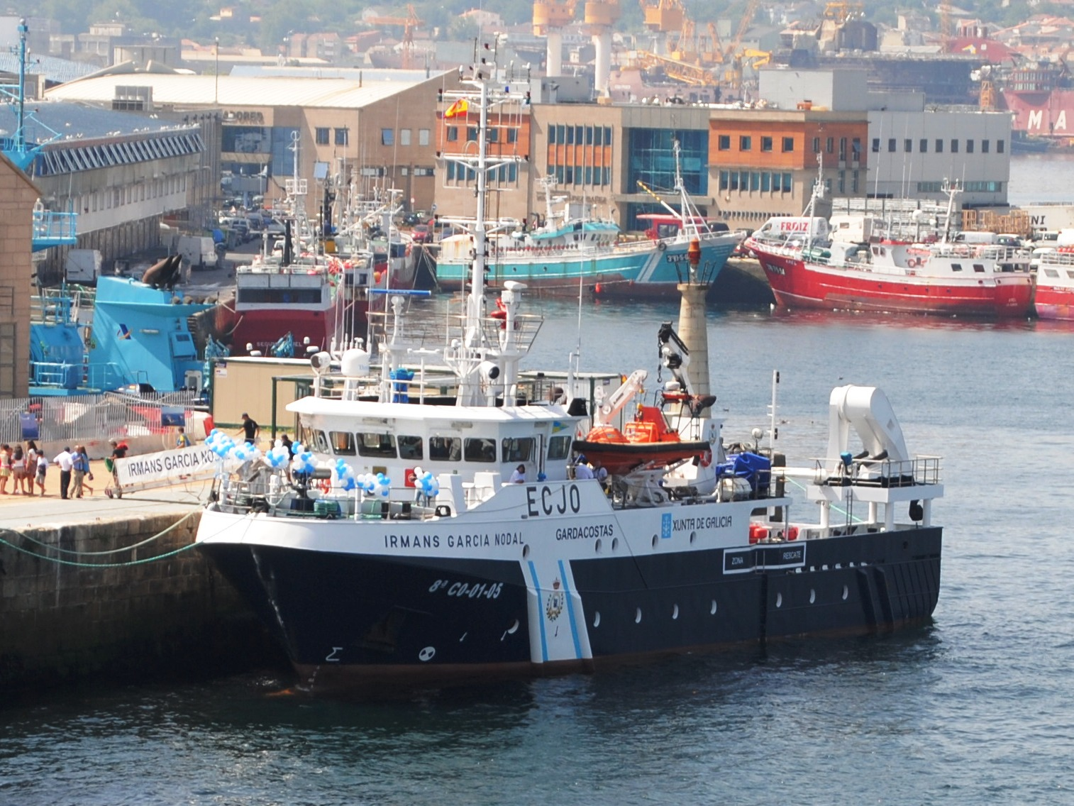 Barco Irmáns García Nodal en Vigo.